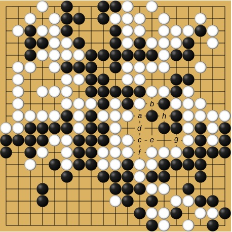 1959年1月9-10日 本因坊対呉清源三番碁第2局 呉清源-高川秀格(先番)終局図